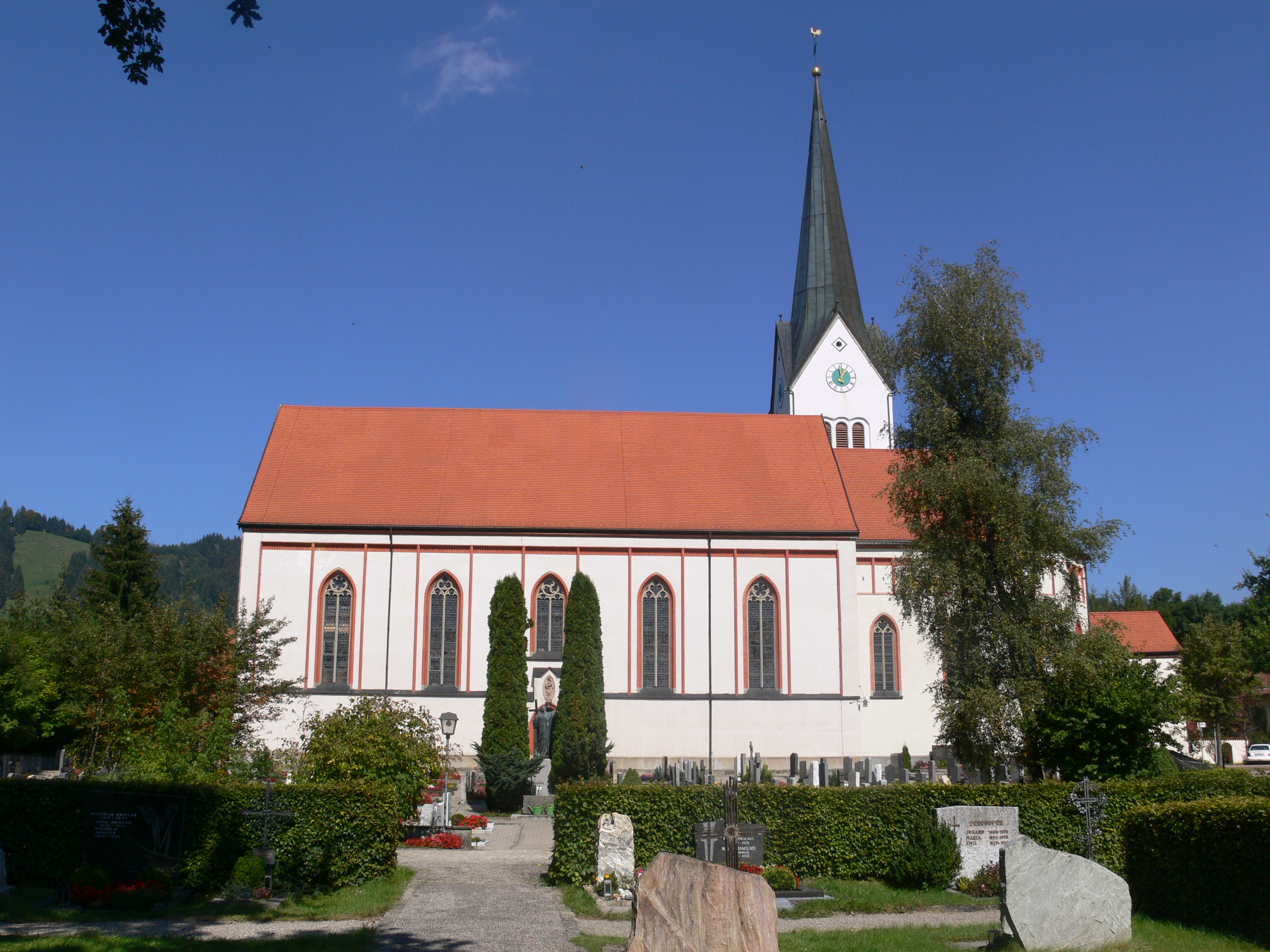 Pfarrkirche St. Pelagius, Weitnau